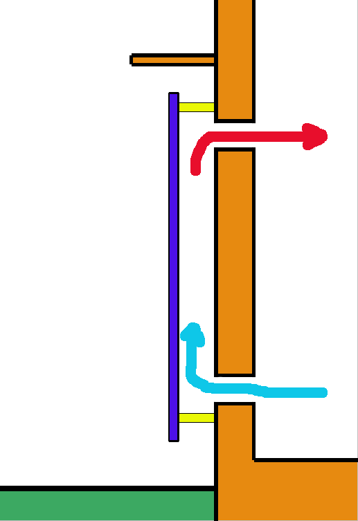 Esquema de funcionamiento muro trombe 1